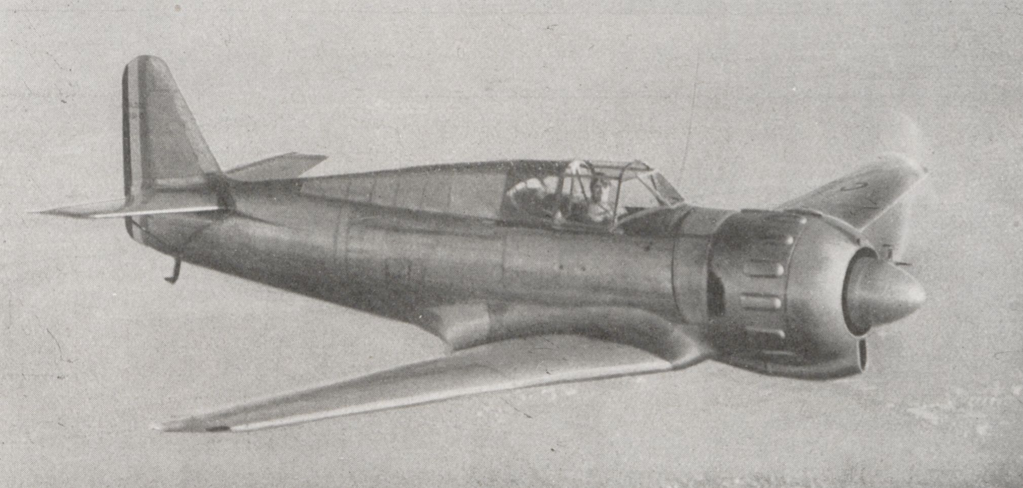 Un aspect en vol du monoplace de chasse BLOCH 151, à moteur GNOME-RHÔNE 14 N 11